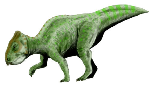 Prenoceratops, pencil drawing, digital coloring